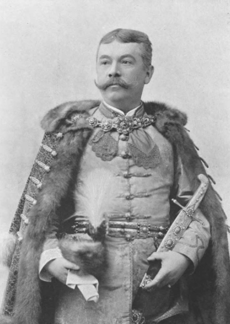 Dr. gróf pribéri és vuchini Jankovich László (1860–1921), Zala vármegye főispánja, a főrendiház örökös tagja, jogász, birtokos